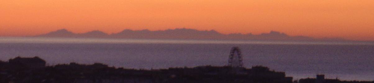 La Corse vue de Nice par réfraction Photo prise le 25 Décembre 2006 à 06h39 TU